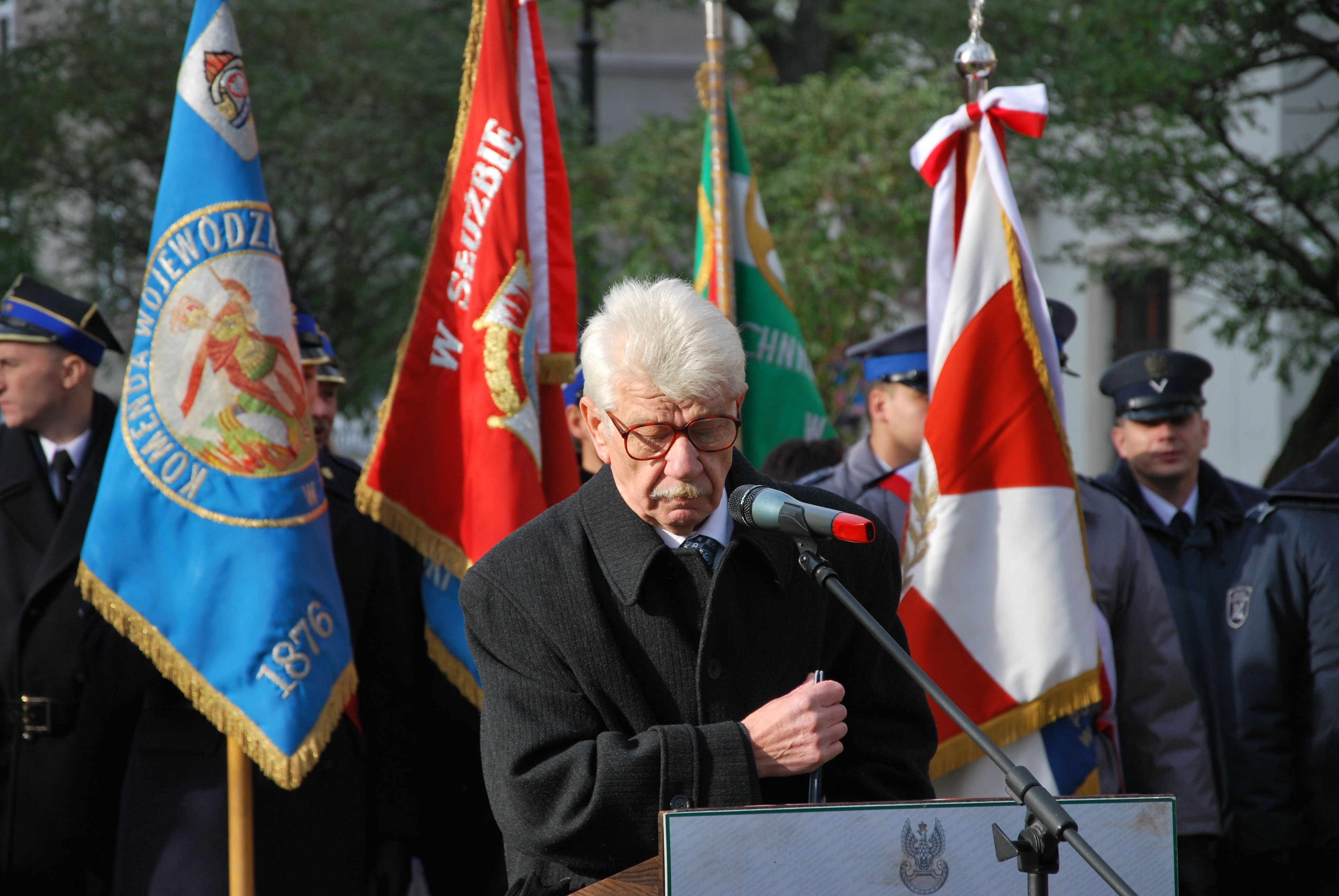 Dzień Niepodległości 2012 w Łodzi, uroczystość prowadził aktor, Jan Paweł Kruk